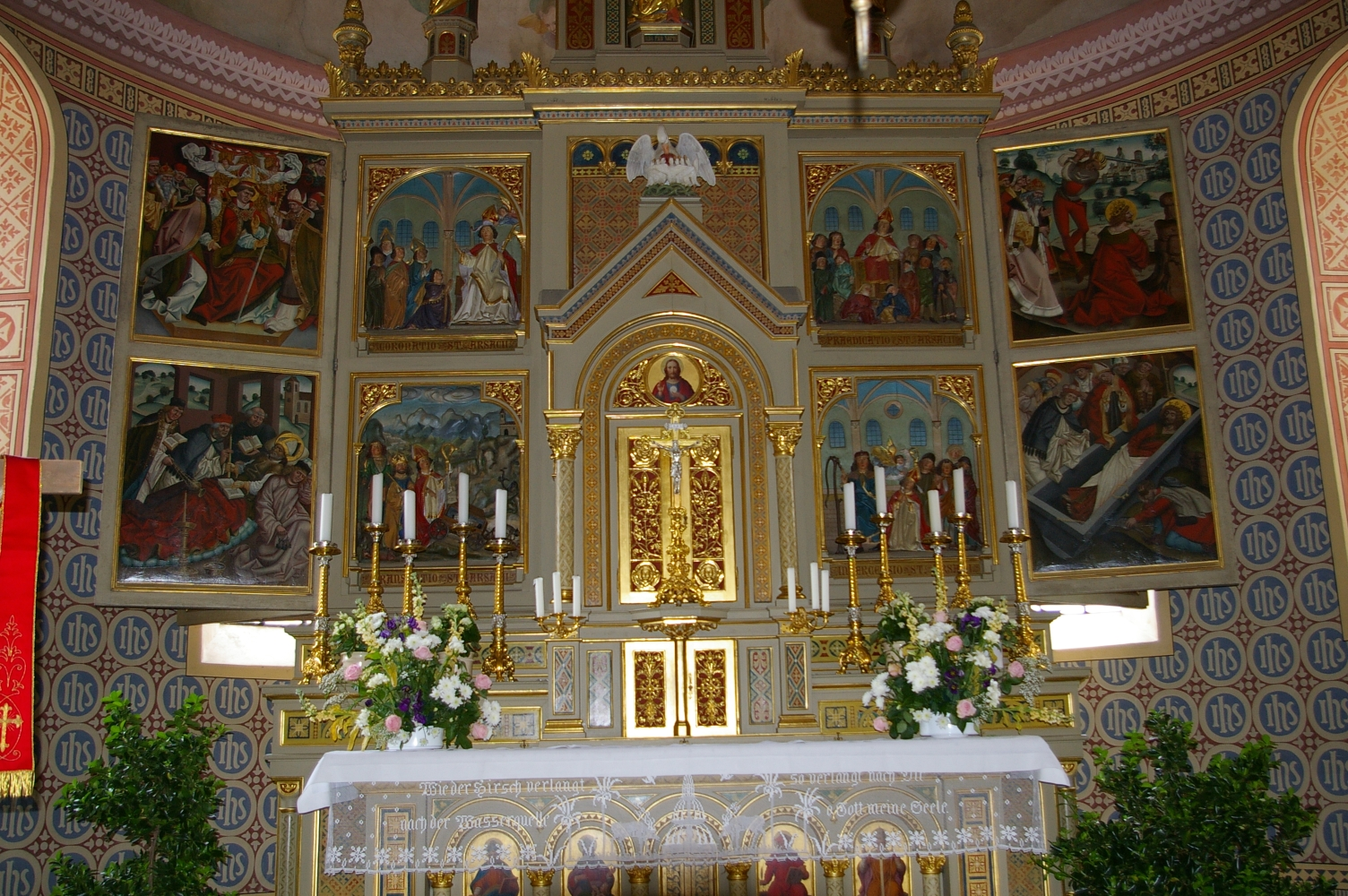 Altar von St. Arsacius in Ilmmünster.